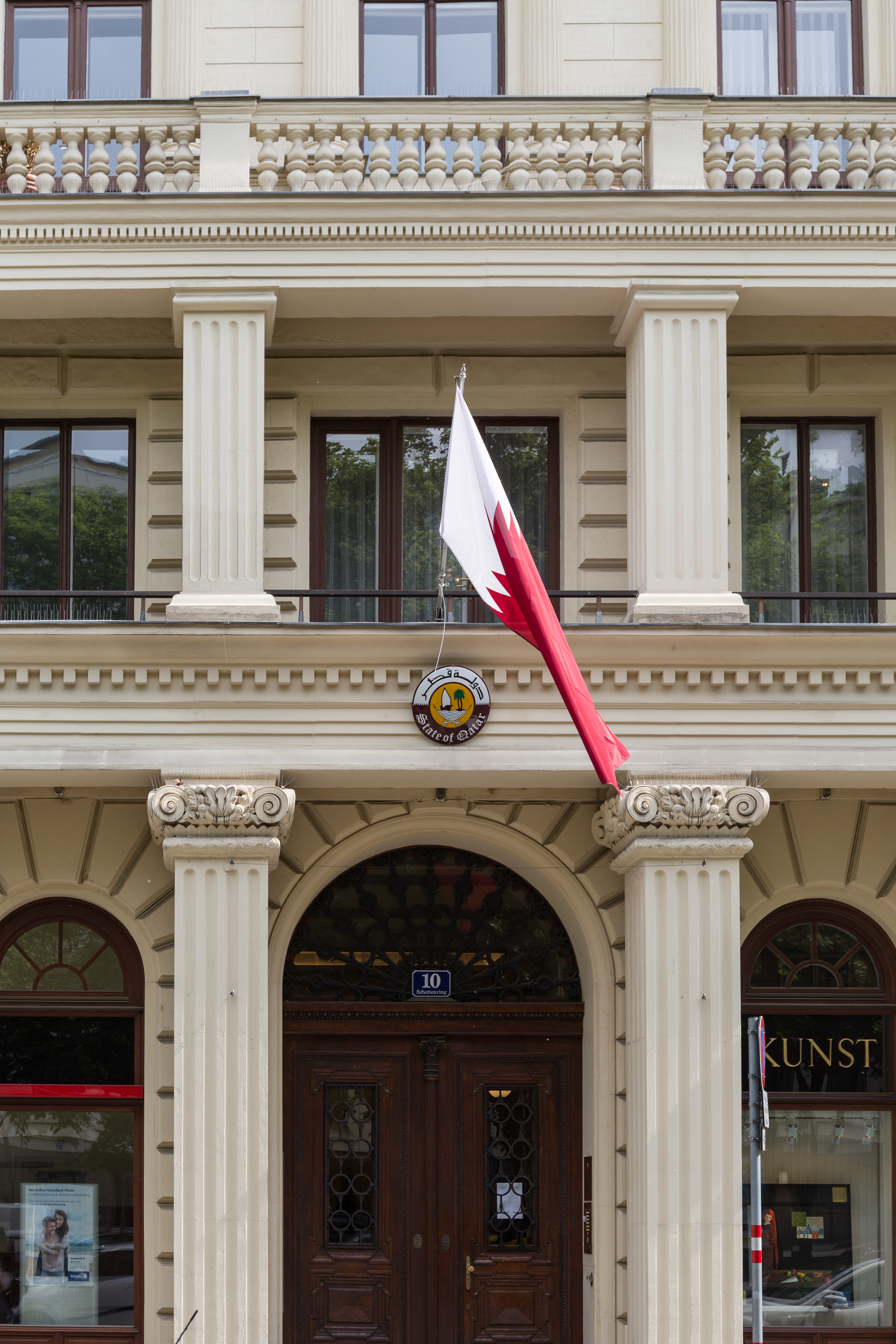 Ambassade du Qatar à Vienne.